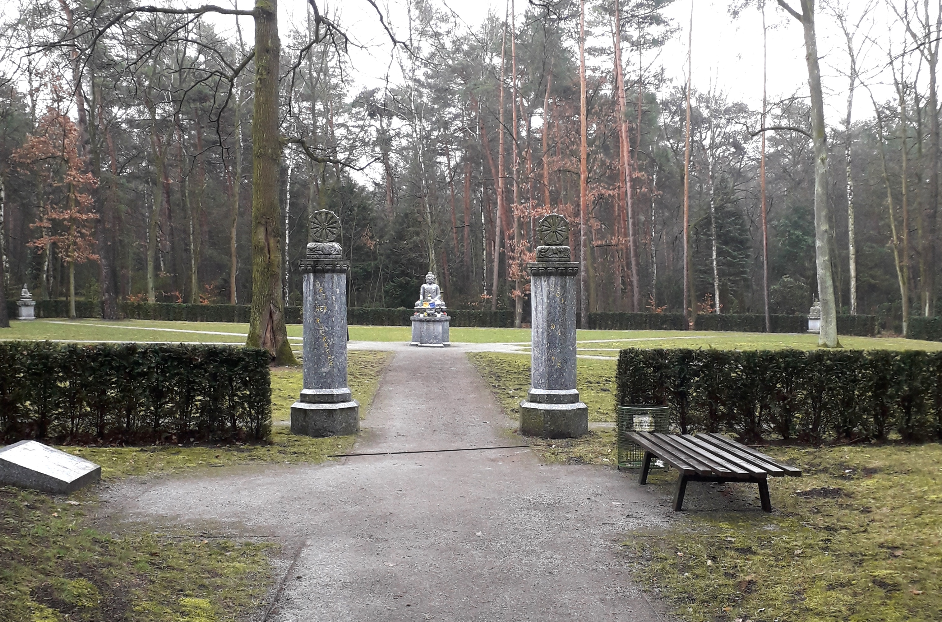 Buddhistische Grabanlage auf dem Heidefriedhof Dresden, Eingangsbereich. Mittig die Granit-Statue des Buddha, davon symmetrisch ausgehend die acht Wege bzw. die acht Flächen, die den Edlen Achtfachen Pfad symbolisieren.